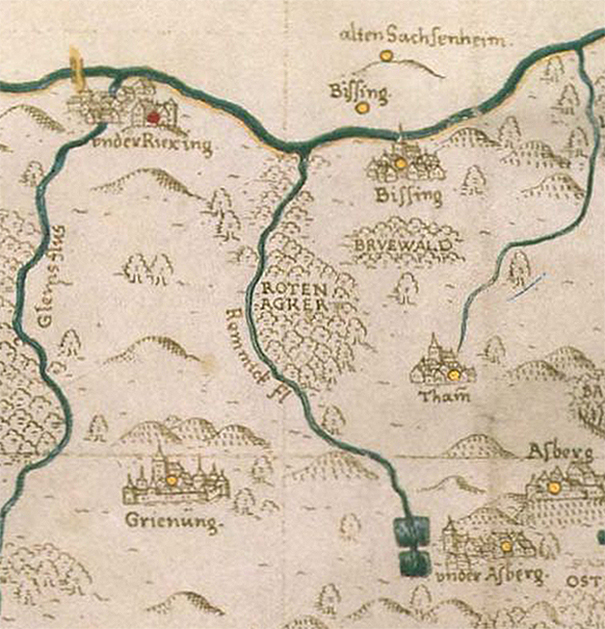 Rotenacker auf der Karte des Leonberger Forsts (Ausschnitt)